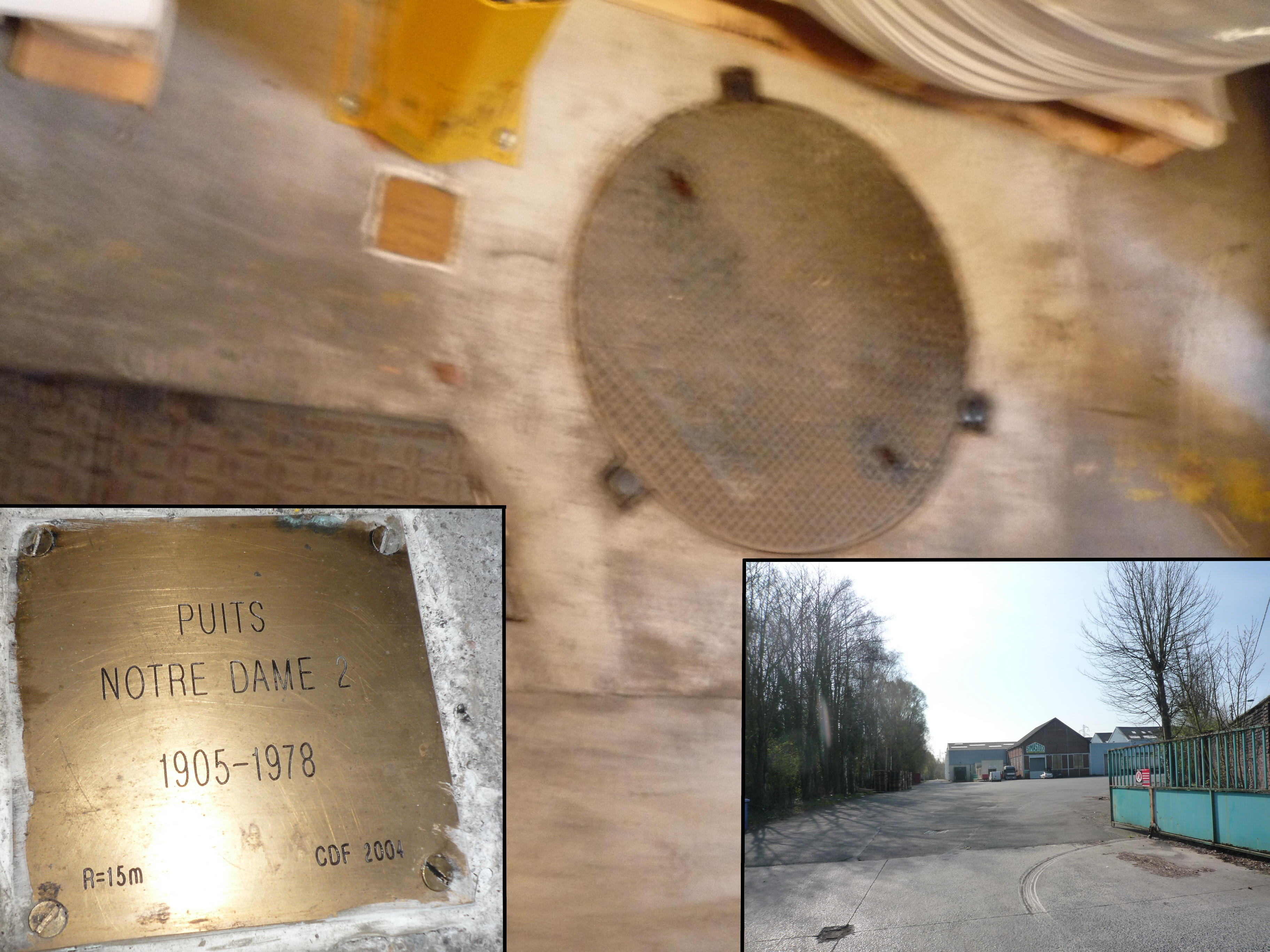 La Fosse Notre-Dame ou Notre Dame de la Compagnie des mines d'Aniche était un charbonnage constitué de deux puits situé à Waziers, Nord, Nord-Pas-de-Calais, France.